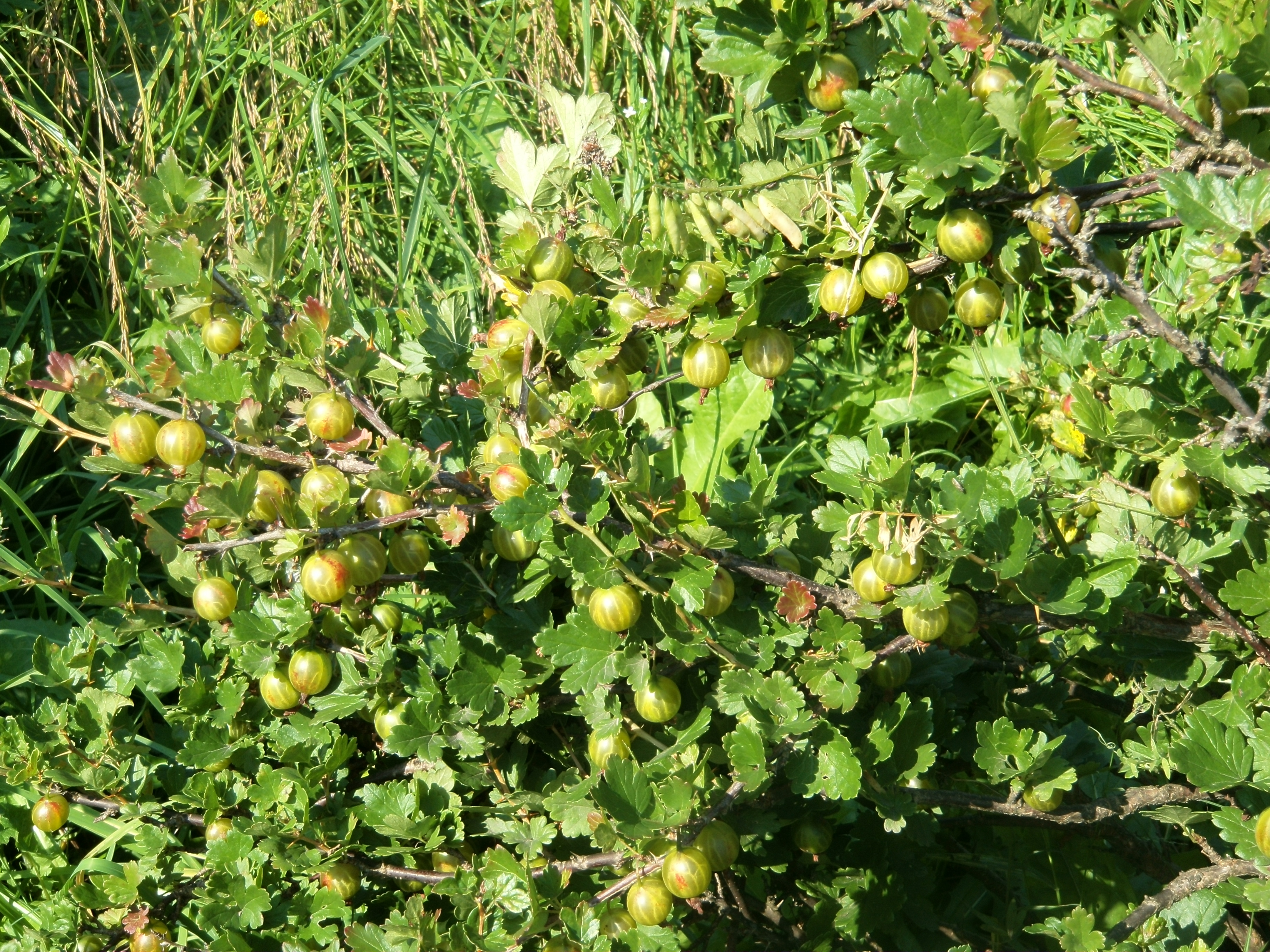 Крыжовник летом 2012 года